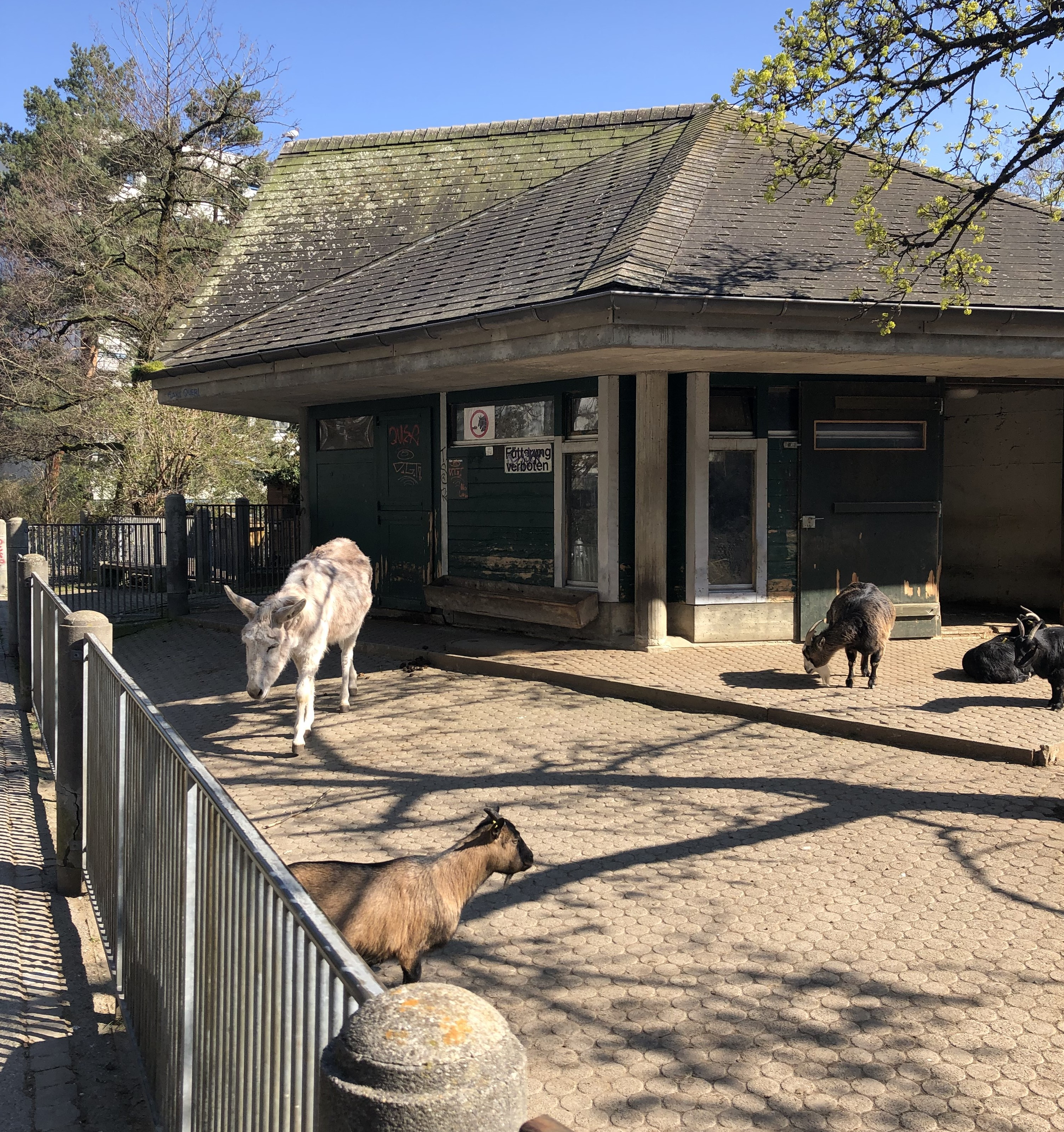 Tscharnergut Tiergehege